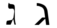 hebrew letter gimel